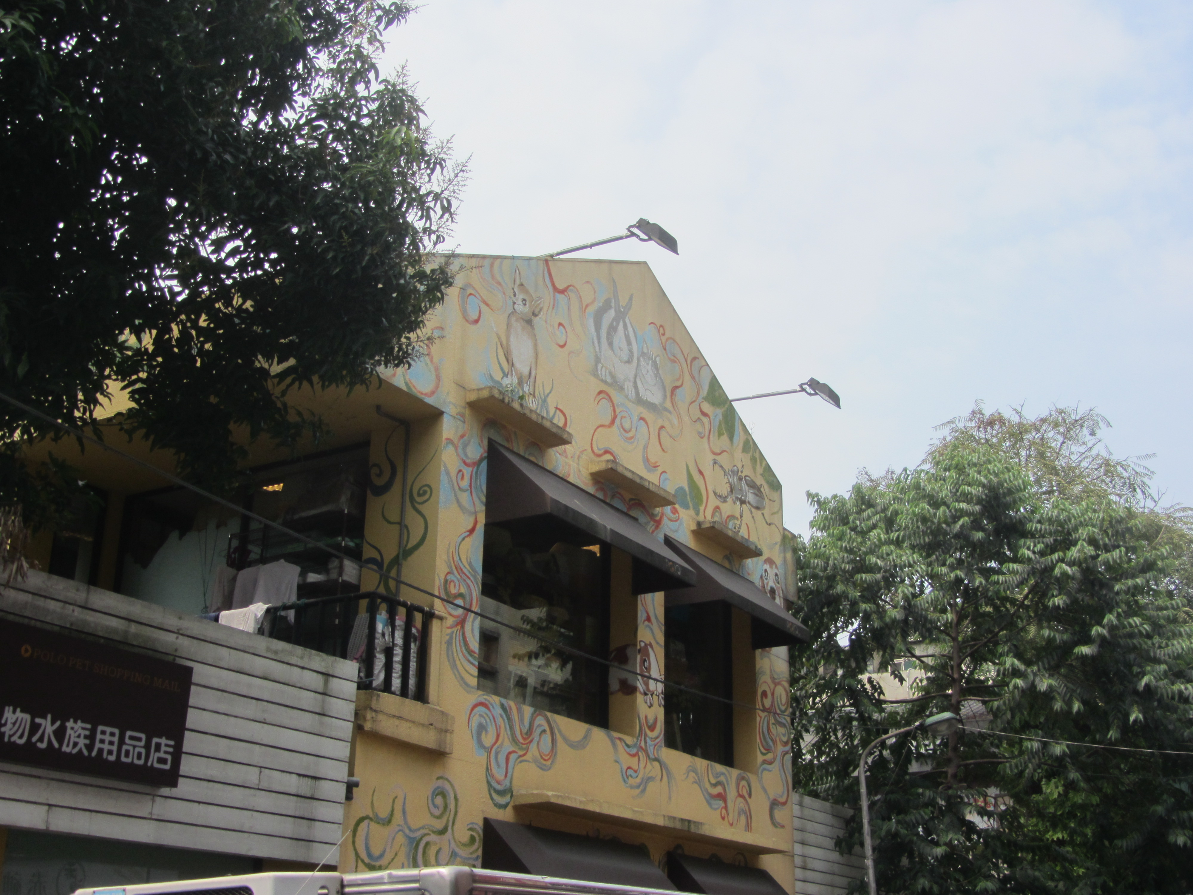 汀州路台鐵舊宿舍